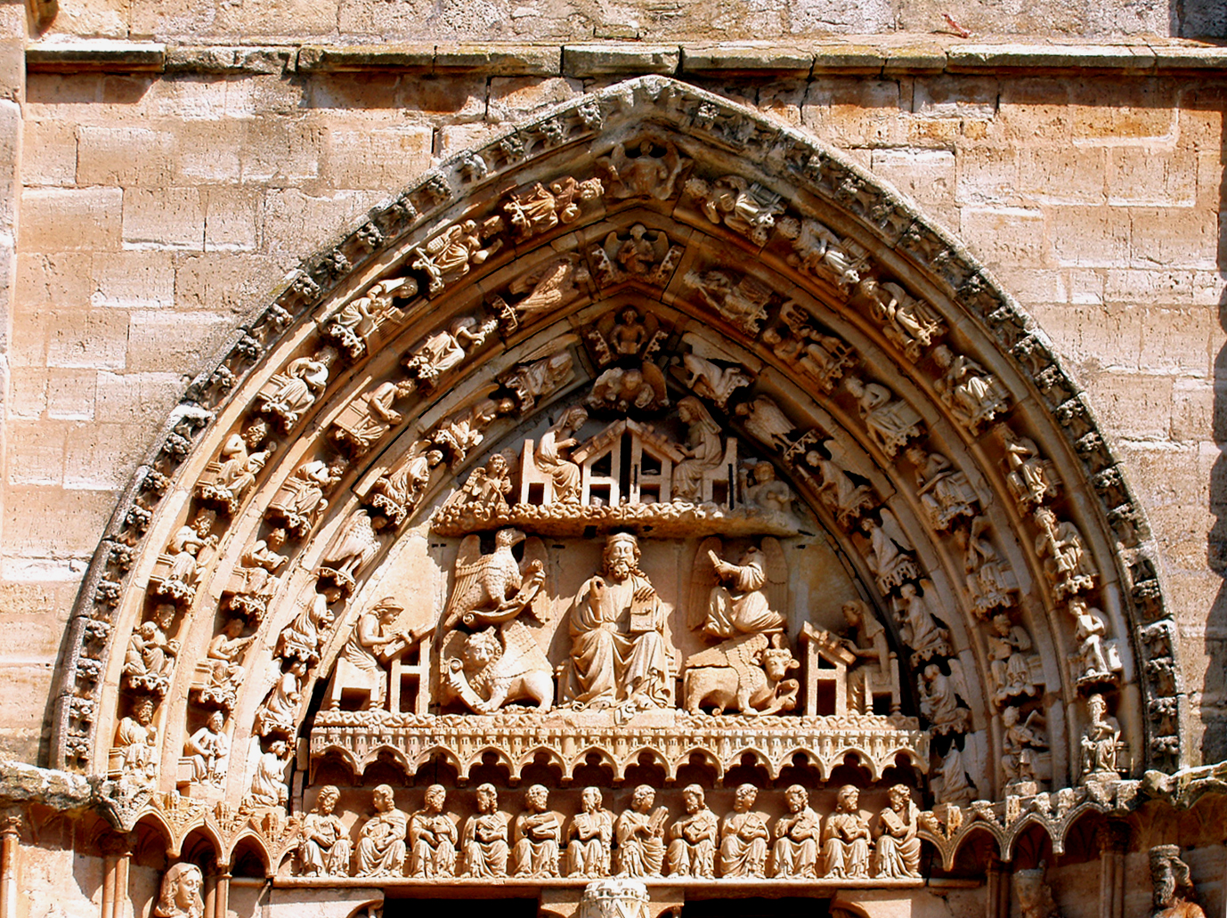 Timpano del Pórtico de la Iglesia Sta. María la Real Sasamón, Burgos, España, s XIII